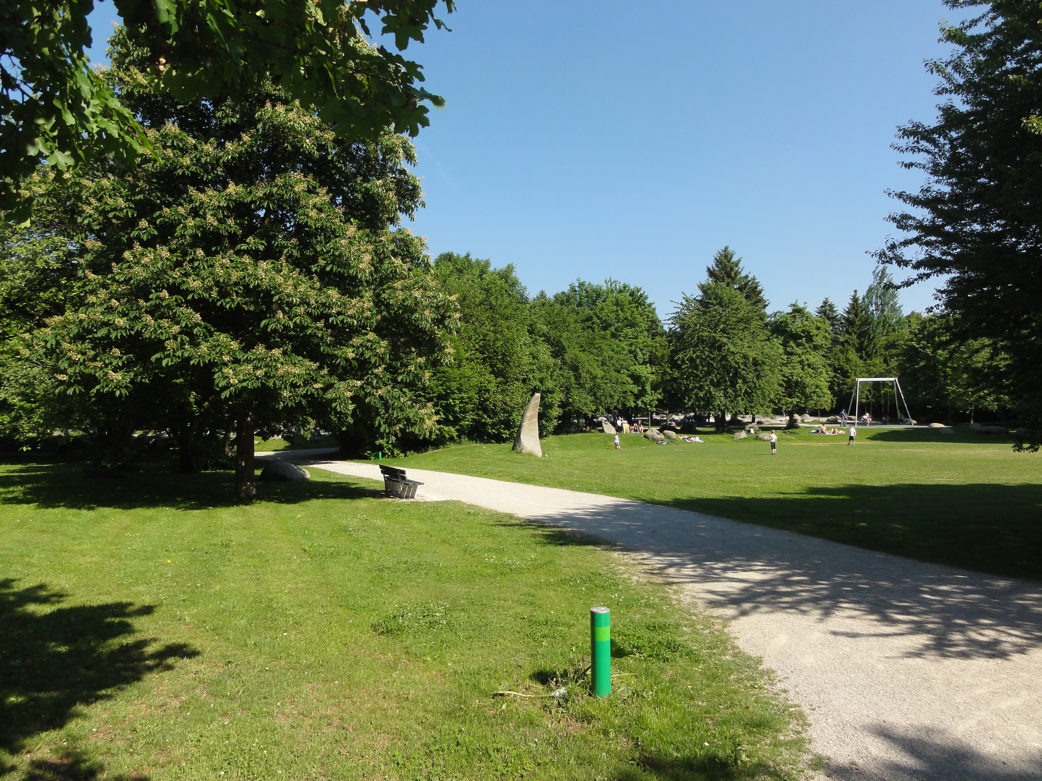 Munich, Germany — Weißenseepark